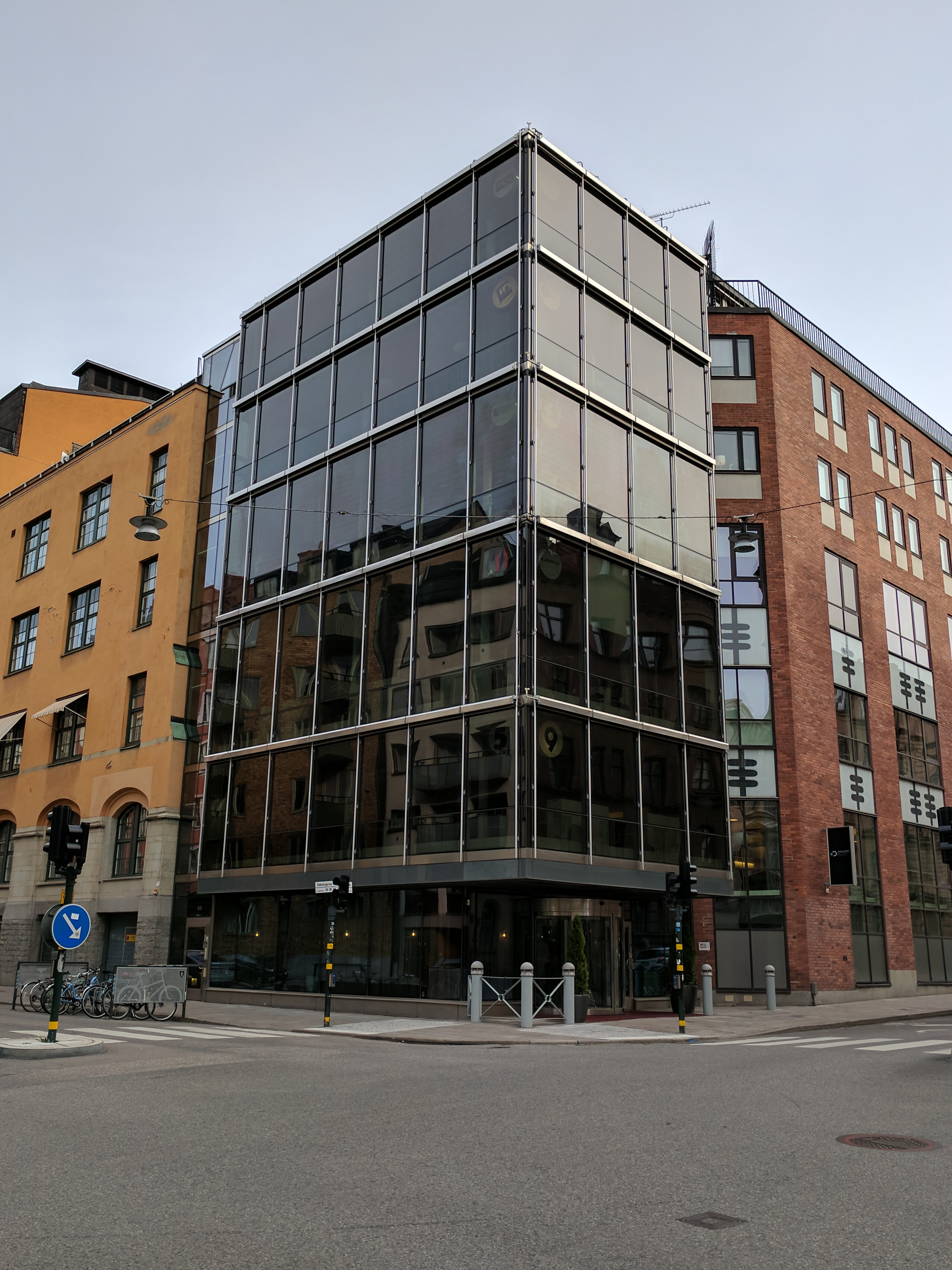 Discovery Networks Sweden